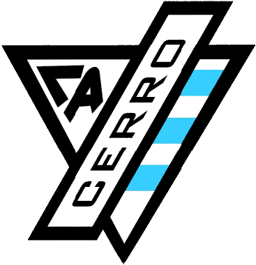 Escudo utilizado actualmente por el Club Atlético Cerro